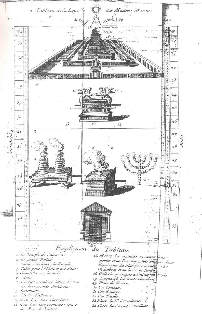 Gravure du livre: Le parfait maçon ou les véritables secrets des quatre Grades d'Apprentifs, Compagnons, Maître ordinaires et Ecossois de la Franche-maçonnerie, imprimé cette année (1745). Tableau de la Loge des Maitres Maçons.